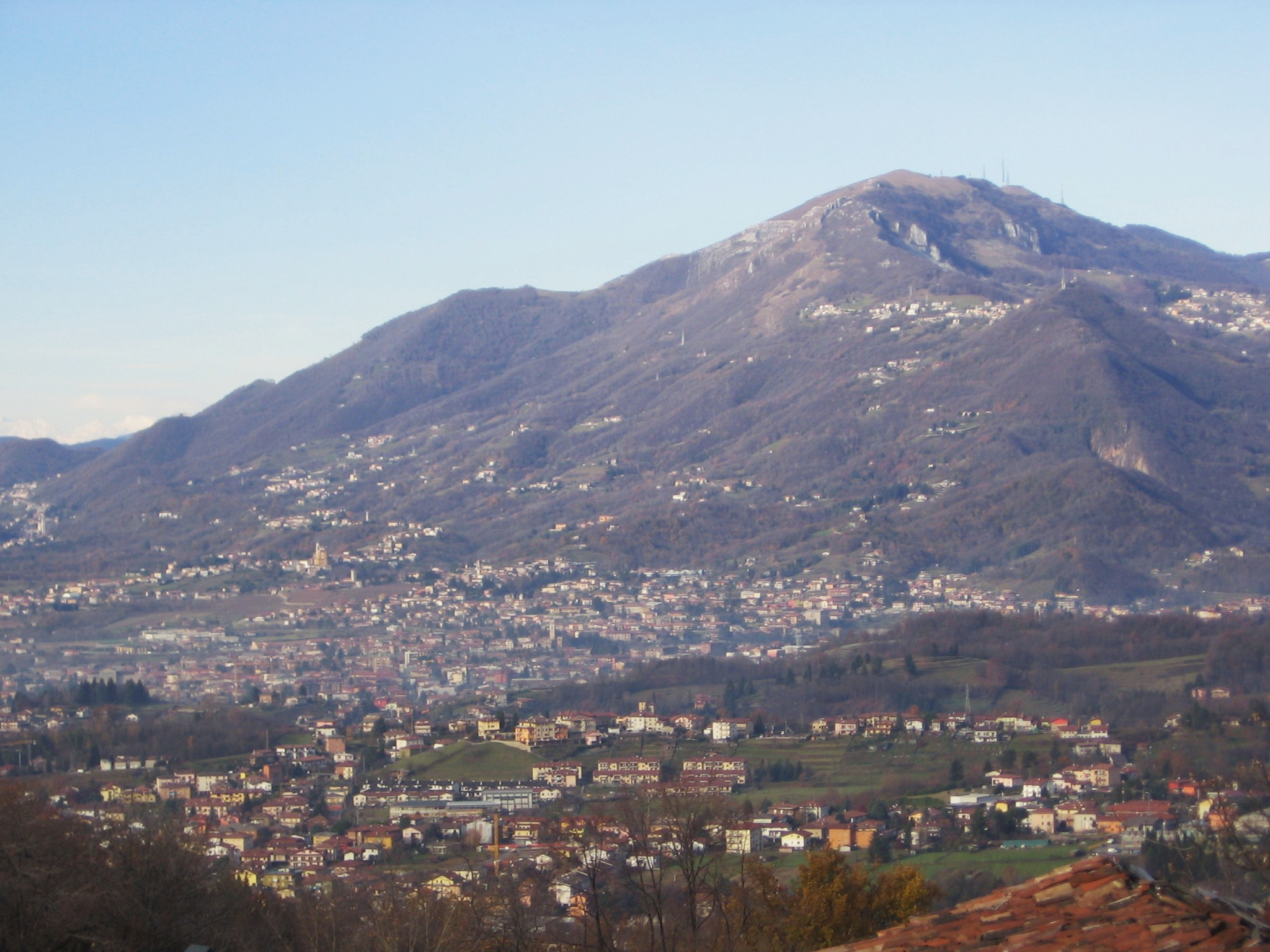 Almennese visto dalla Maresana